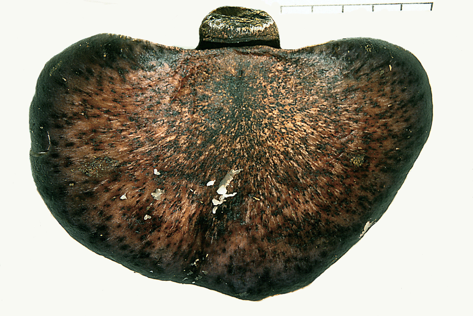 Omphalotus japonicus (ex Lampteromyces) -Daniel Guez, 京都大学演習林, Kansaï, Japan -Sur Castanea crenata (châtaignier)